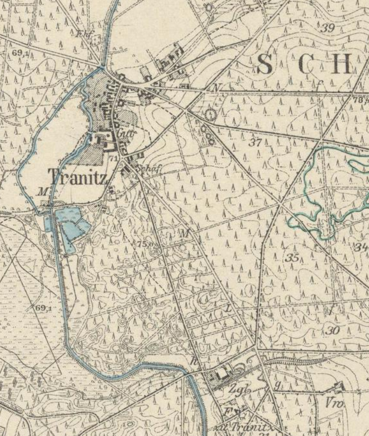 Tranitz, devastiert 1984, Gemarkung Dissenchen, Stadt Cottbus, Brandenburg, Ausschnitt aus dem Messtischblatt 4252 Cottbus-Ost von 1921